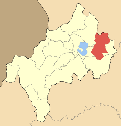 Дем Свети Врач на картата на Ном Костур, Гърция Locator map of Agion Anargiron municipality (Δήμος Αγίων Αναργύρων) at Kastoria perfecture, Greece).